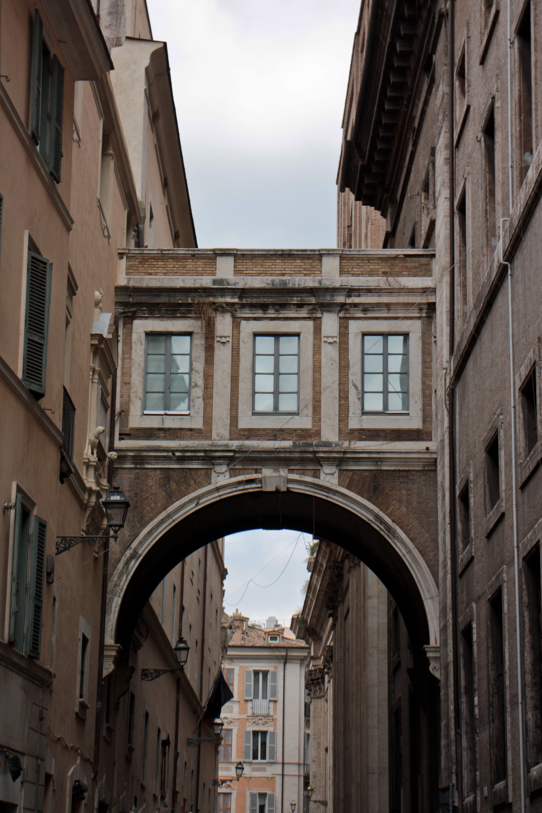 Biblioteca Casanatense - MIBAC - Passaggio coperto alla chiesa di S. Ignazio This is a photo of a monument which is part of cultural heritage of Italy.